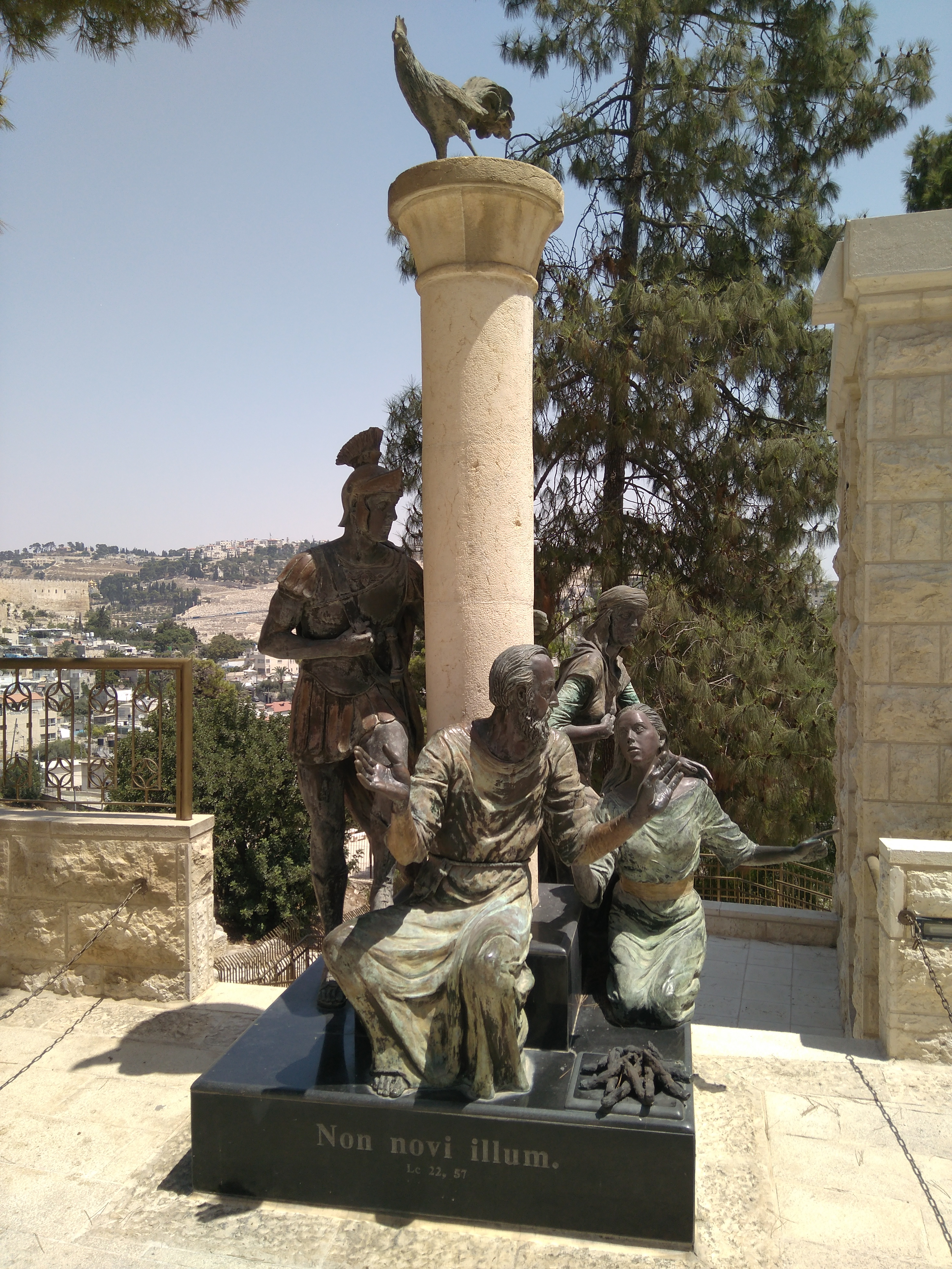 Escultura de San Pedro representando o momento do canto do galo na noite do prendemento de Xesús. (Xerusalén)